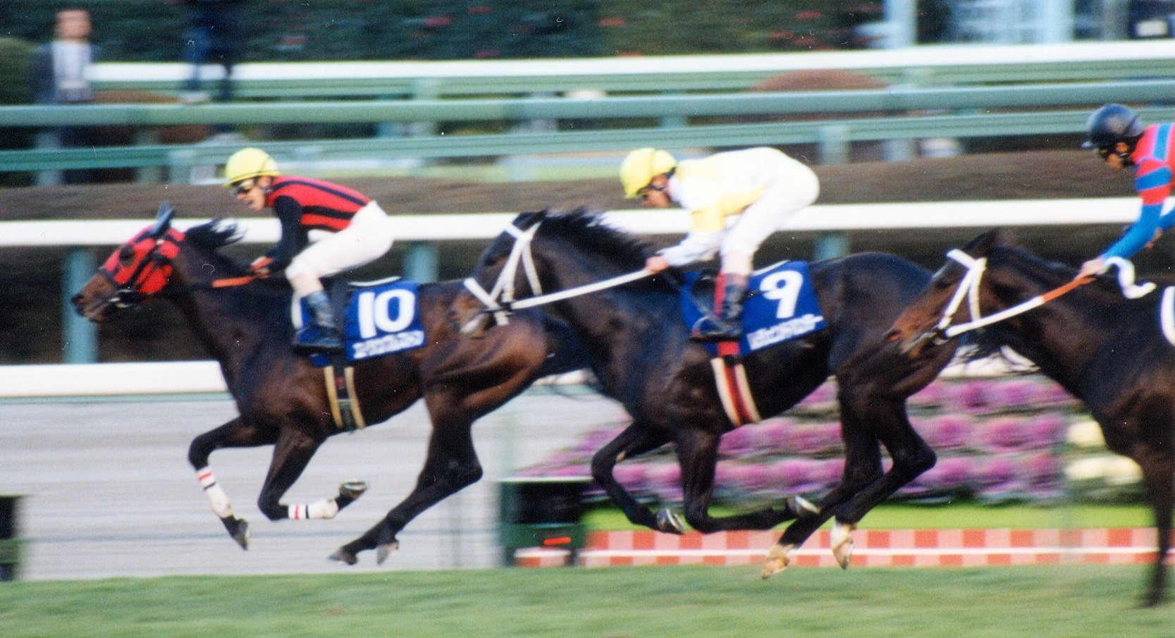 Asahihai 3sai Stakes